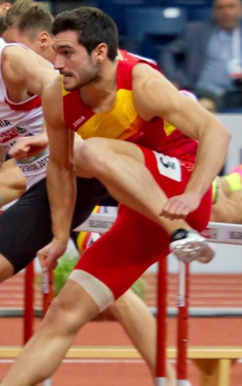 266 hept 60mH mayer urena distelb